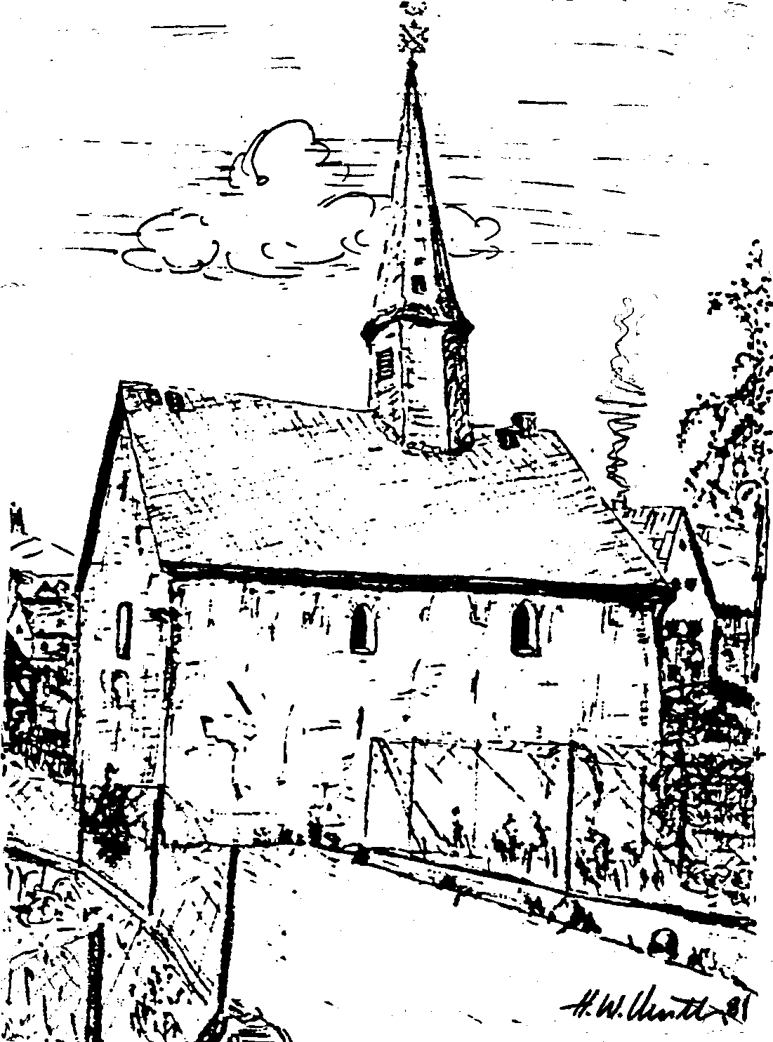 Alte Kirche (Kapelle) in Wommelshausen, "Marienkapelle"